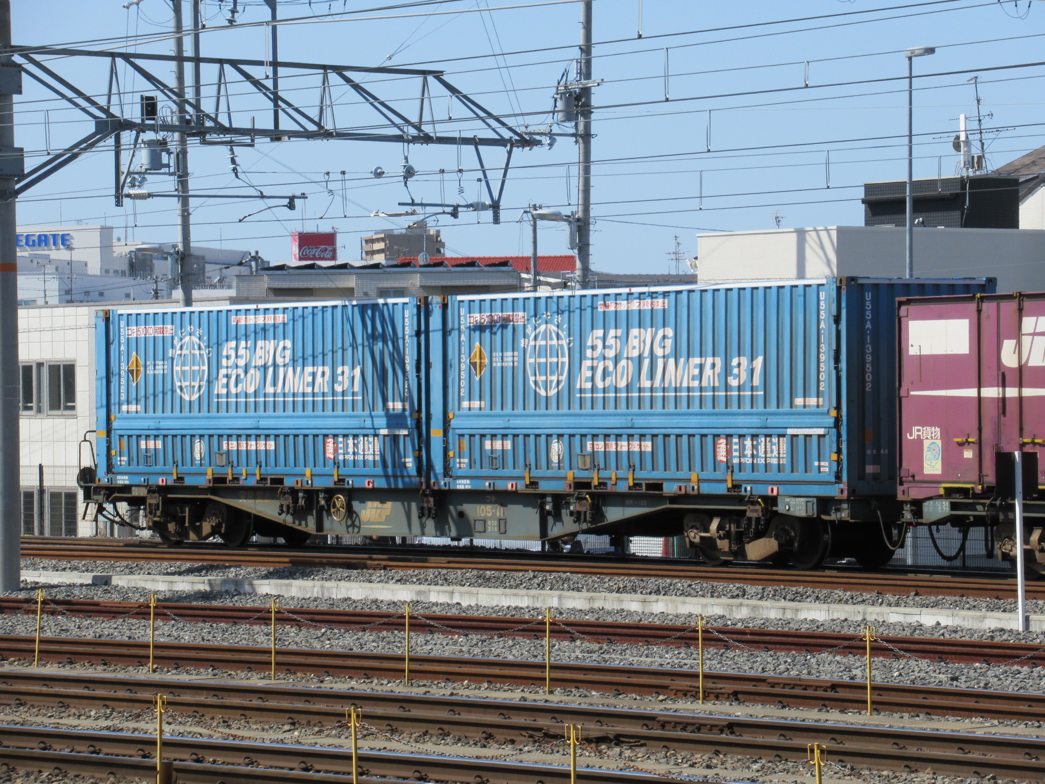 コキ105-11